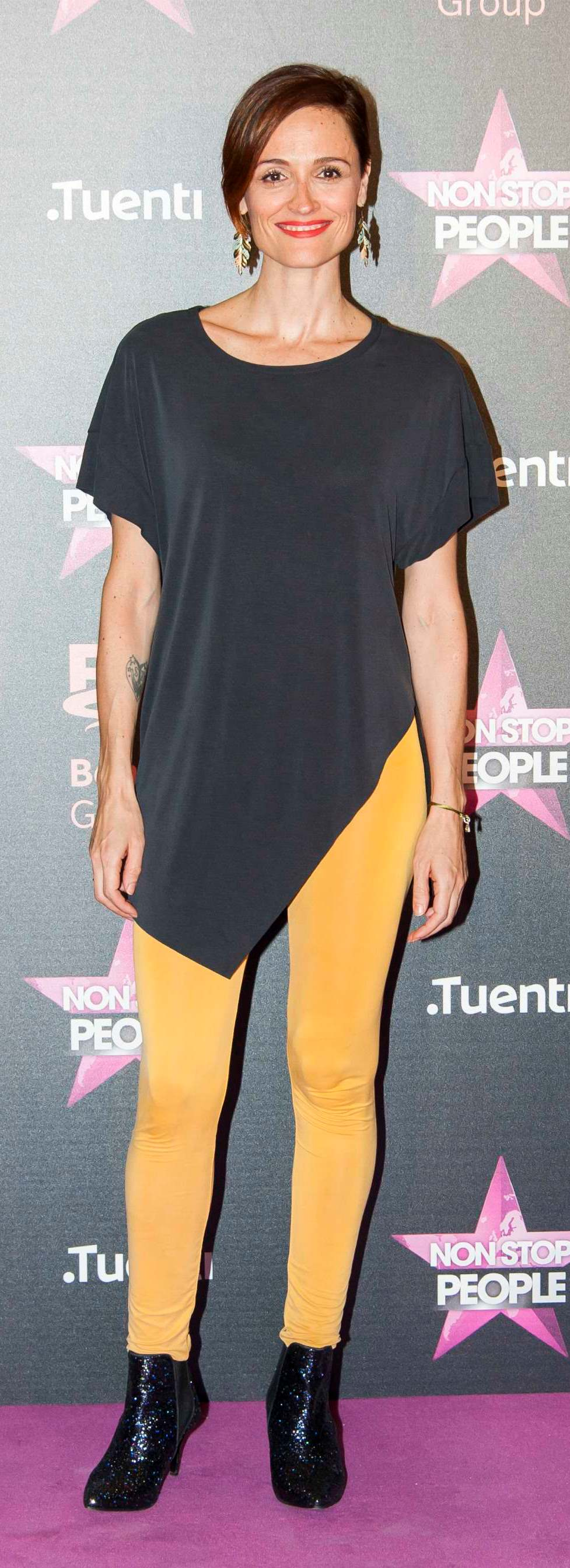 La actriz española LAURA PAMPLONA en 2015.